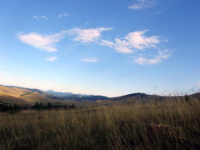 Description:Природне лепоте Златибора author: Snezana Trifunovic Source: self-made